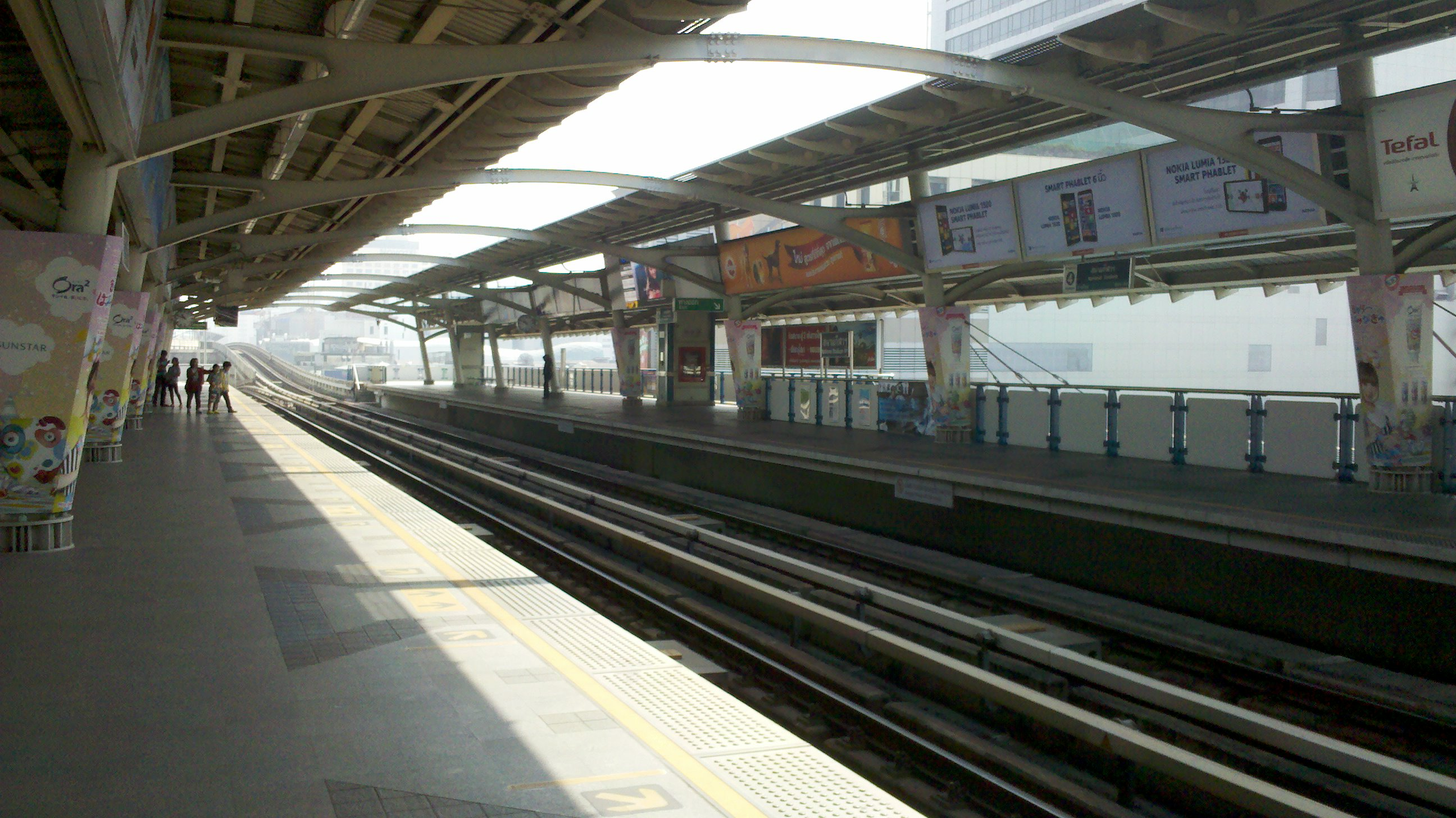 สถานีสนามกีฬาแห่งชาติ National Stadium station